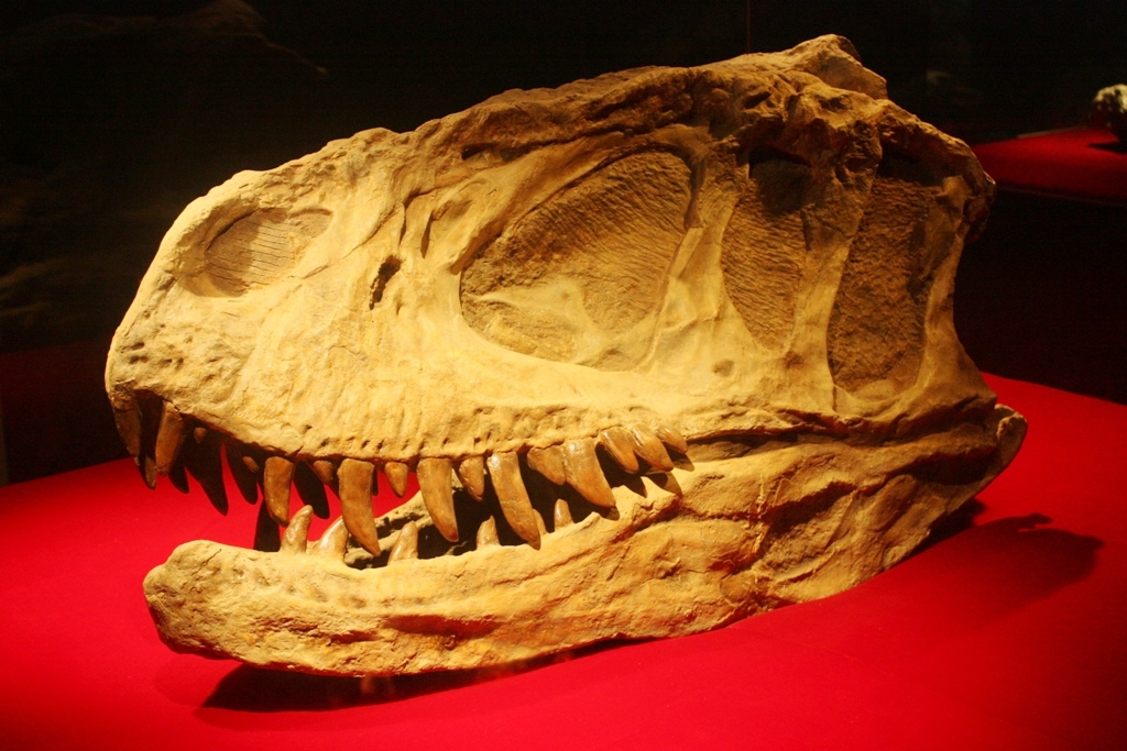 Sinraptor